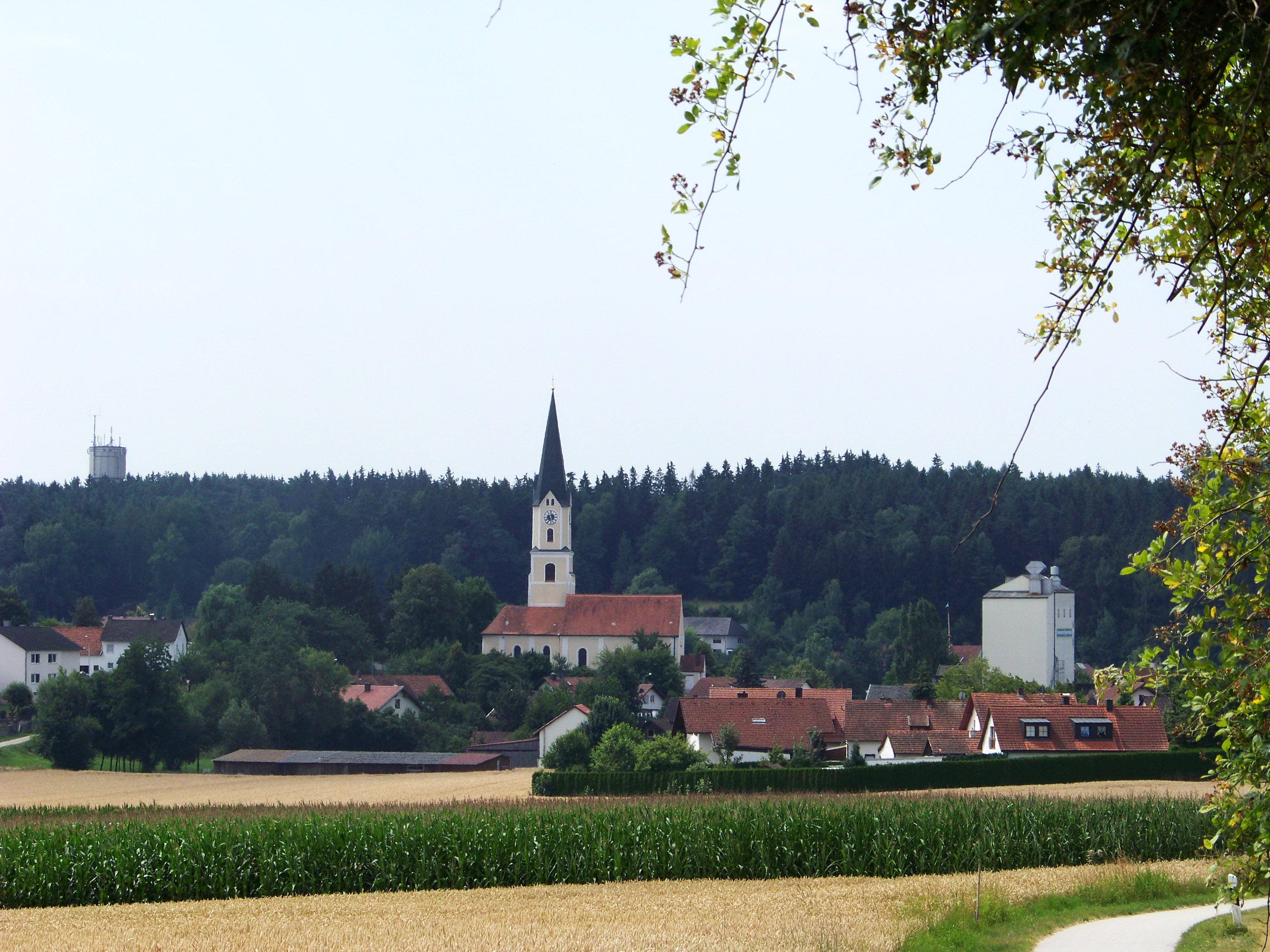 Weihmichl, Hauptstraße 24. Pfarrkirche St. Willibald. Saalkirche mit eingezogenem Chor, Langhaus und Chor barock. Turmuntergeschosse spätgotisch, mit Lisenengliederung, südlich Chorflankenturm mit Geschossgliederung, achteckigem Aufsatz und Spitzhelm.